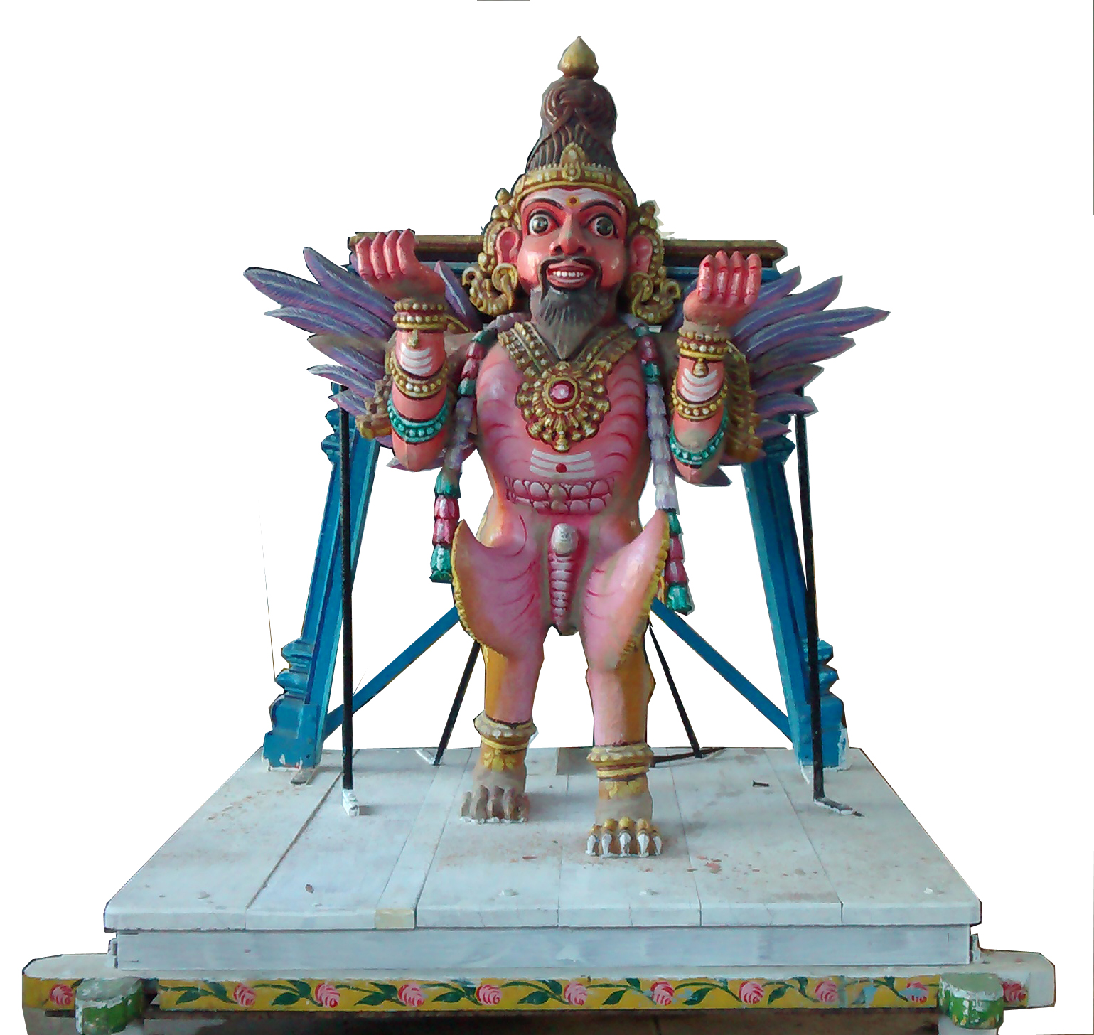 புருசா மிருக வாகனம் சைதாப்பேட்டை காரணீசுவரர் கோயில்